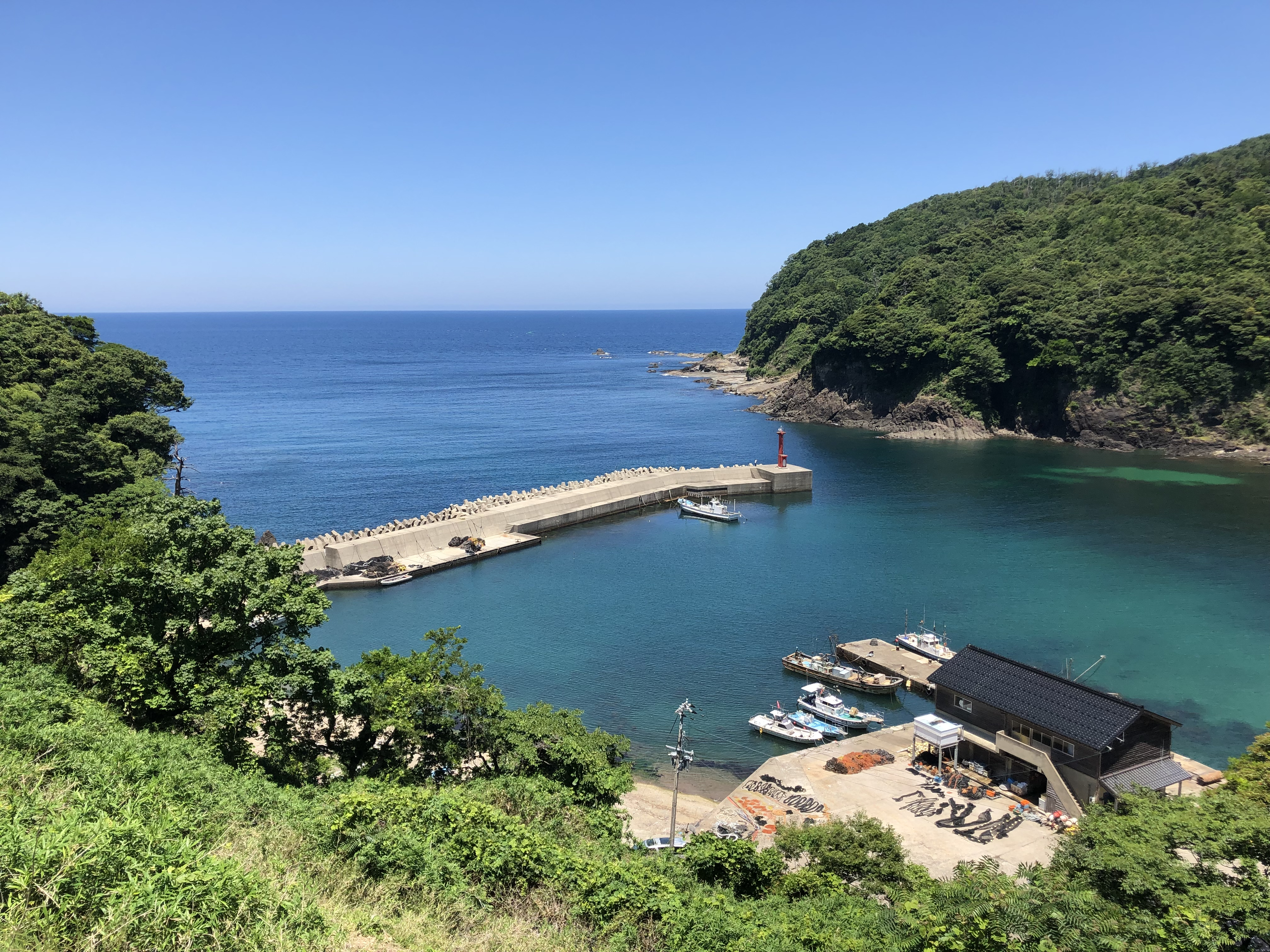 西日本旅客鉄道 鎧駅 旧1番線ホームから日本海を見下ろす